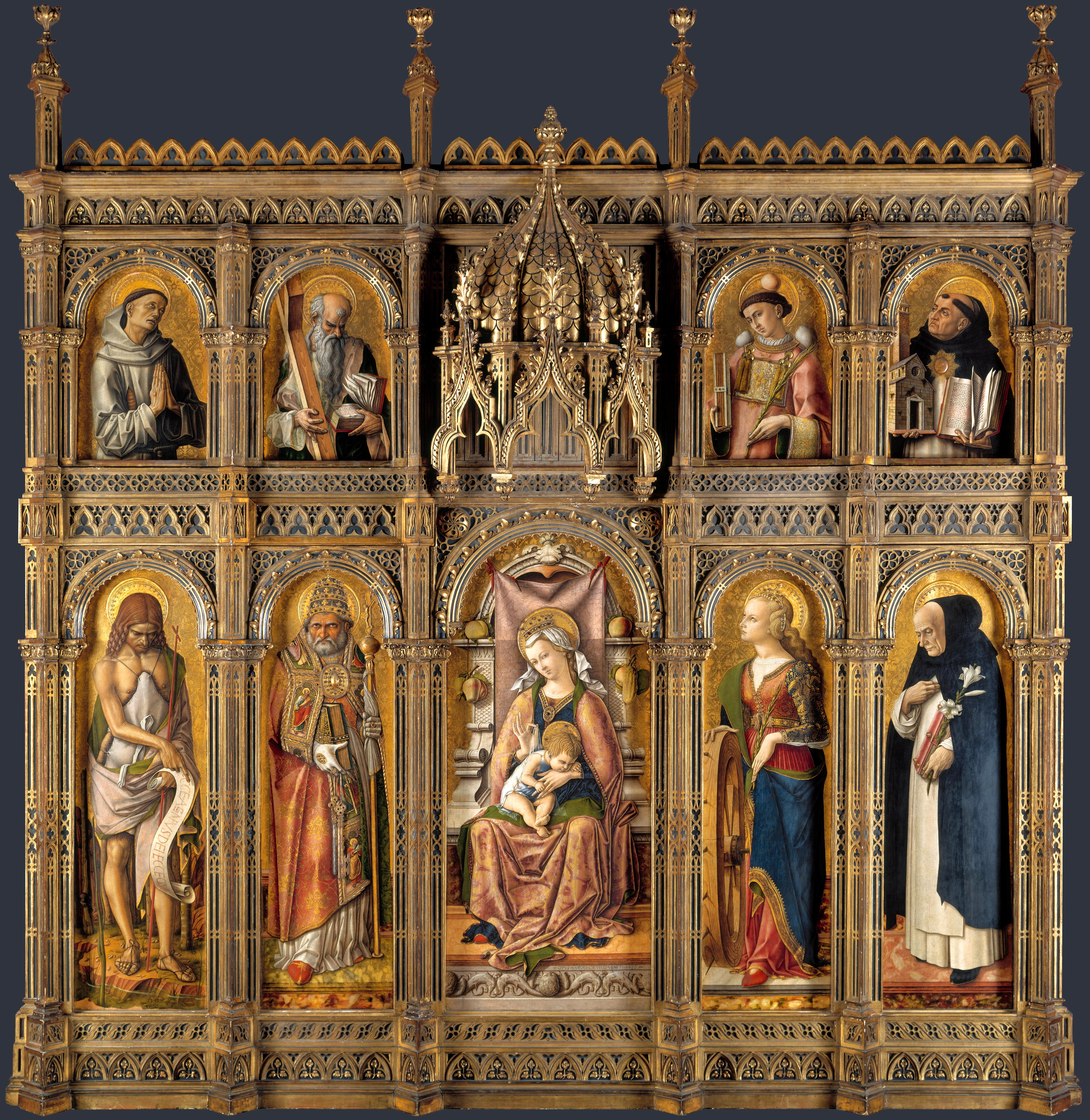 Haut de l'autel, de gauche à droite : Saint François d'Assise, Saint André, Saint Étienne, Saint Thomas d'Aquin Bas de l'autel : Saint Jean le Baptiste, Saint Pierre, la Vierge à l'enfant, Sainte Catherine et Saint Dominique